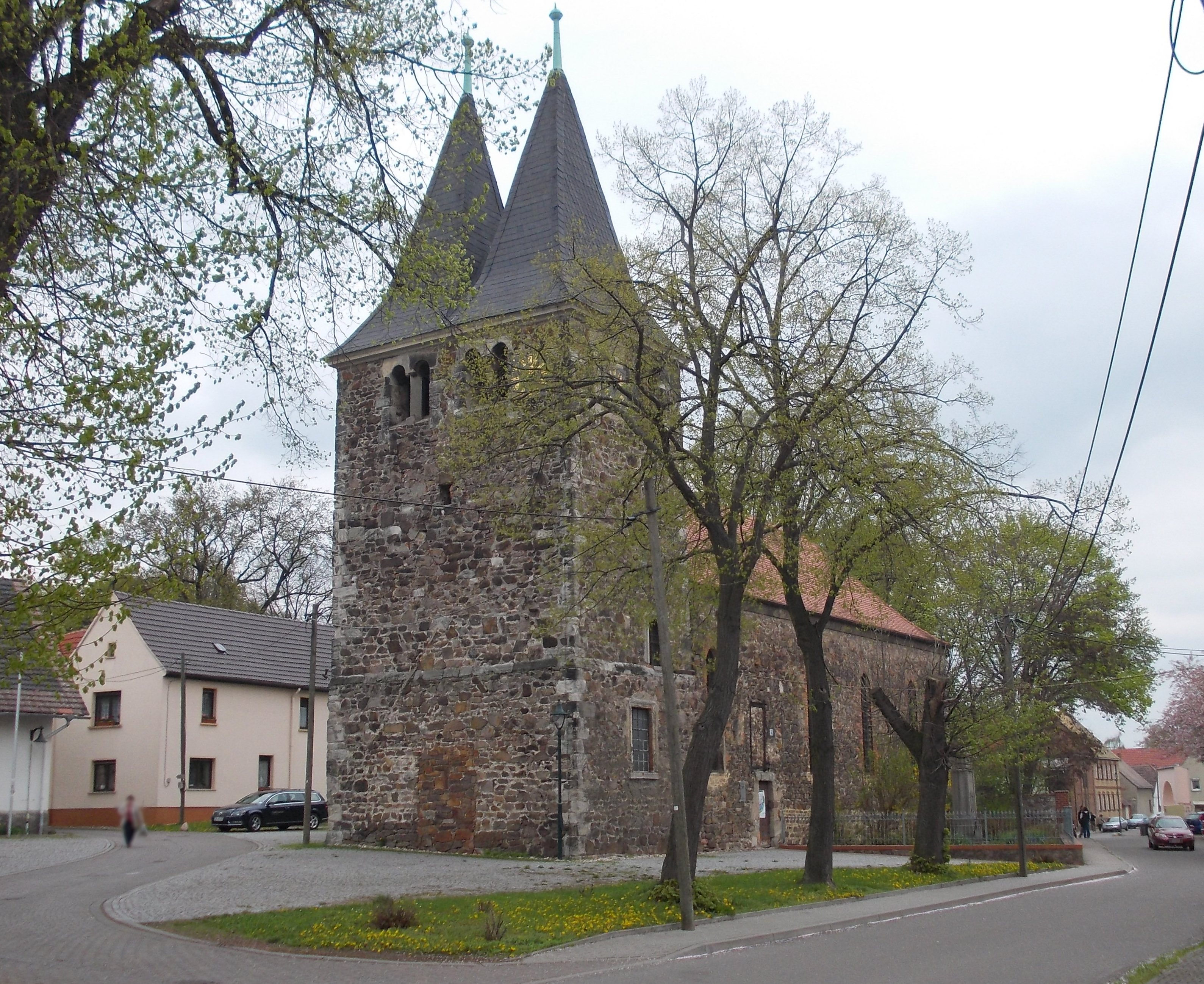 Kirche St. Michael in Brachstedt (Gemeinde Petersberg)